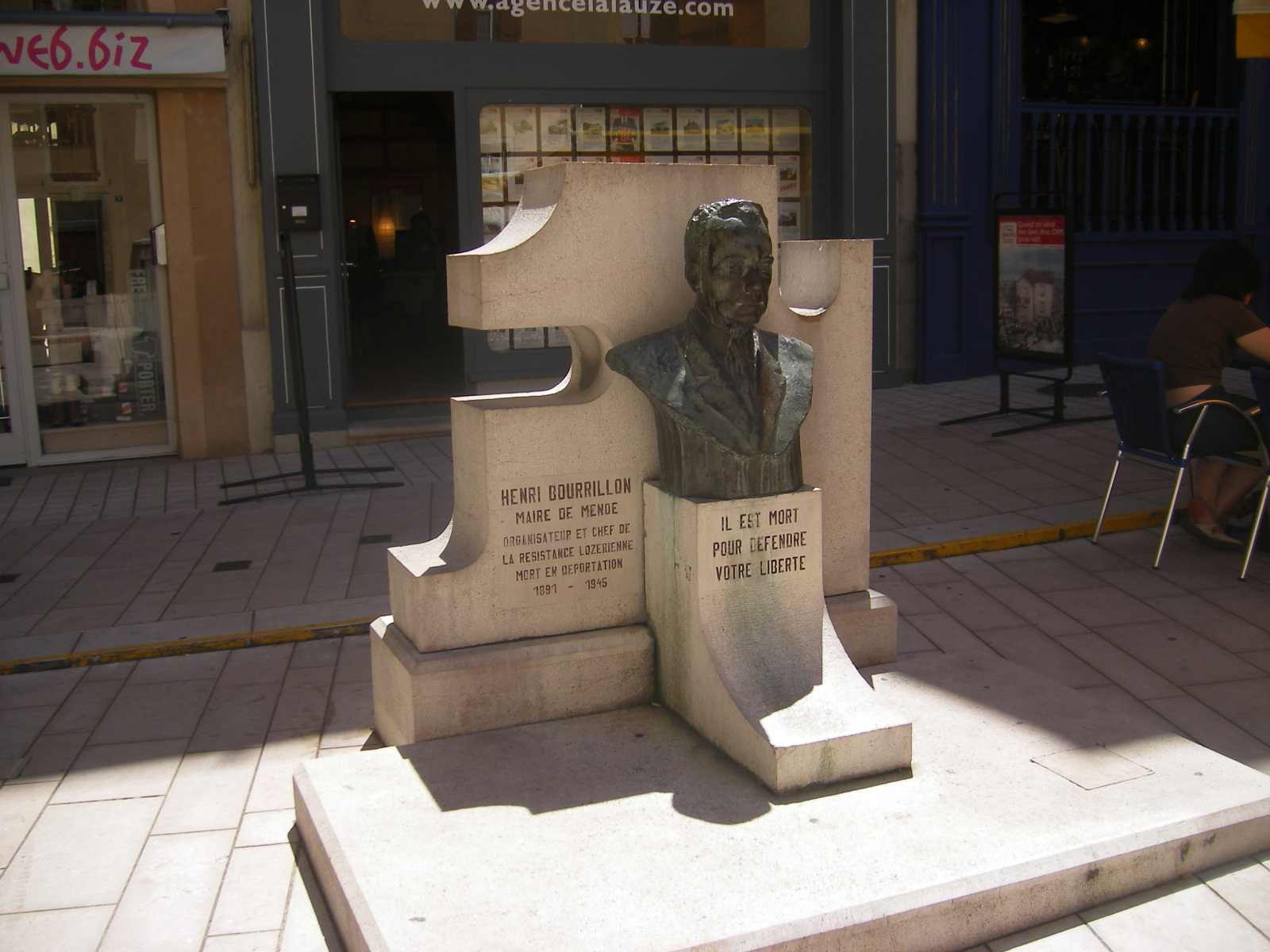 Mende - Henri Bourillon monument